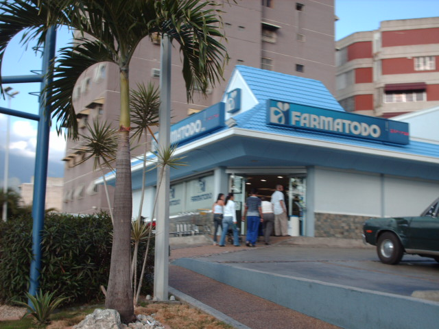 Tienda de Farmatodo.